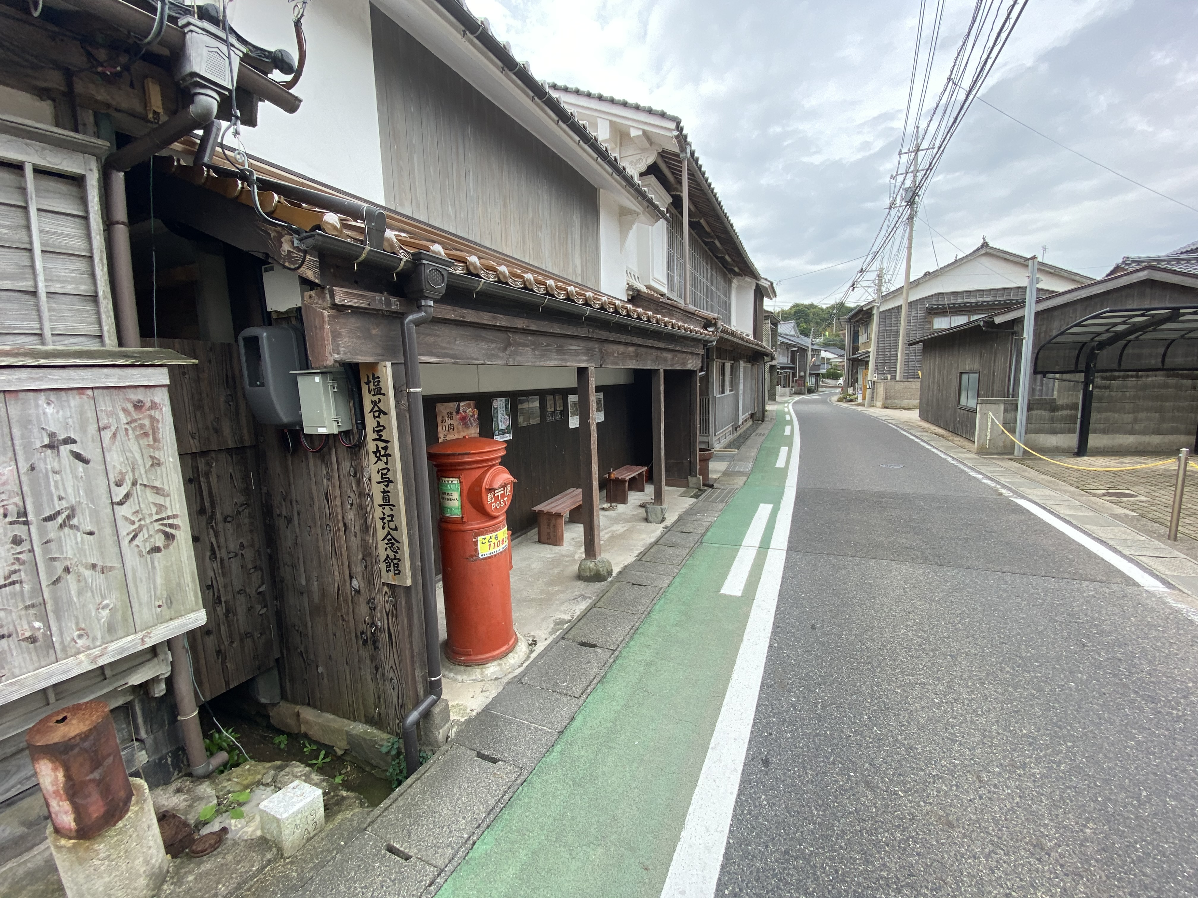 所在地は鳥取県東伯郡琴浦町。 JR赤碕駅近くの県道267号線に面しており、車の場合は、琴浦町駐車場（三度傘前広場）を利用